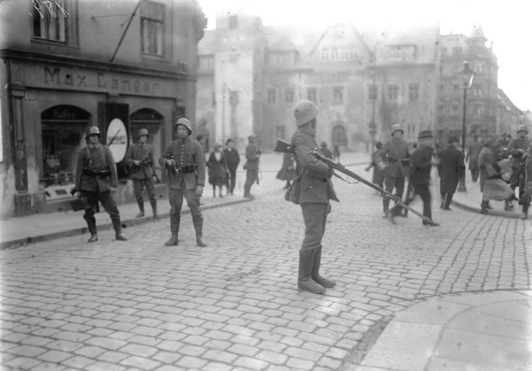 Vorgehen der Reichswehr gegen die kommunistischen Hundertschaften in Sachsen. Abriegeln einer Strasse durch Reichswehr mit gefälltem Bajonett in Freiberg in Sachsen. Information added by Wikimedia users.Richtigstellung: Es handelt sich um Freiberg in Sachsen, vgl. [File:Freiberg Obermarkt Rathaus.jpg]